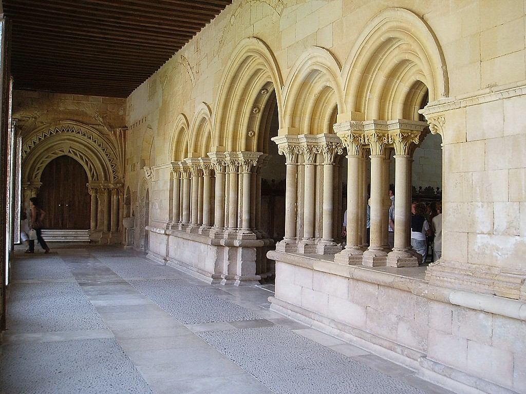 Sala capitular del Monasterio de San Andrés del Arroyo, Santibáñez de Ecla (Palencia)